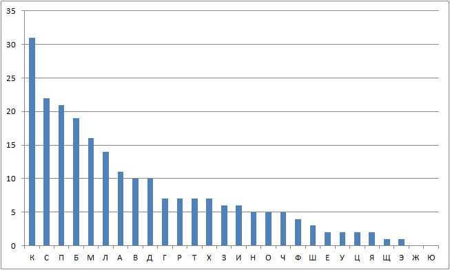 Распределение всех существующих переименованных улиц Тюмени по первой букве дает экспоненциальную зависимость, описываемую законом Ципфа